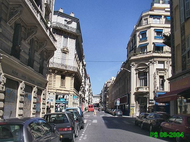 Rue Hancy, direction N. Adroite, à l'angle de l'avenue Notre-Dame, le Palais Bréa. La caserne de pompiers se trouve un peu plus loin.